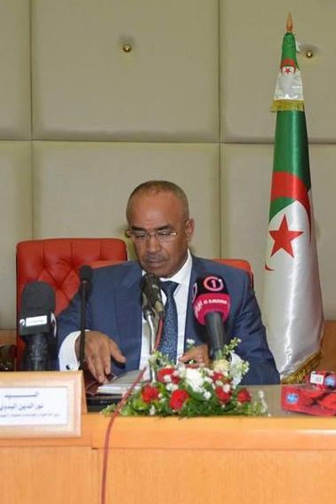 Noureddine Bedoui